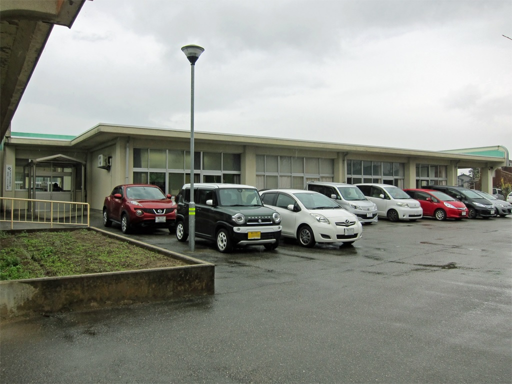 富山県立高志支援学校 こまどり分校